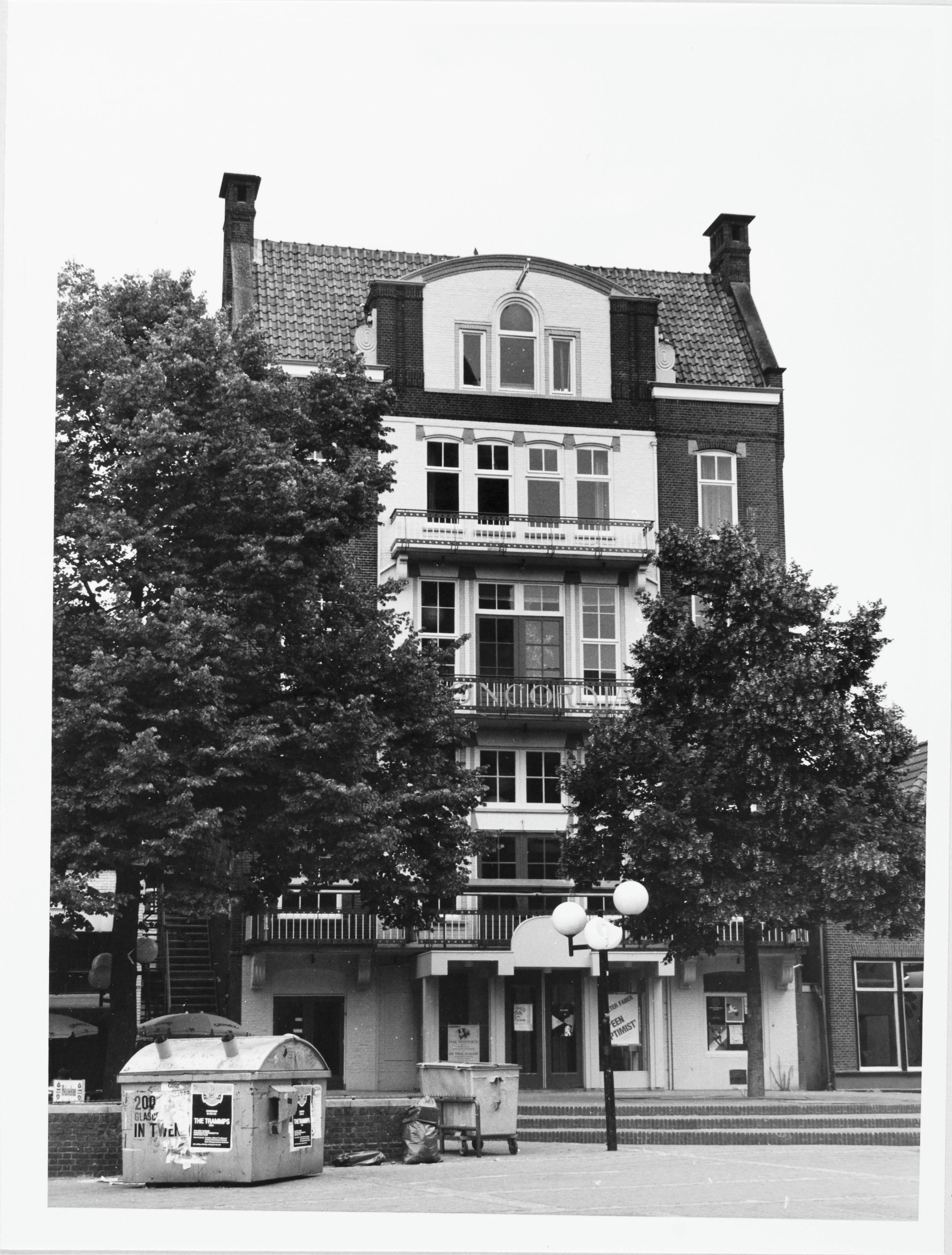 Concordia: Overzicht van de hoge voorgevel (opmerking: Afdrukken verkregen via Ypie Attema, oud medewerkster van de Rijksdienst voor de Monumentenzorg.)